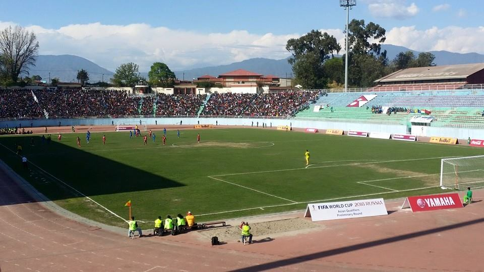 नेपाल भाषा: Kathmandu, Nepal